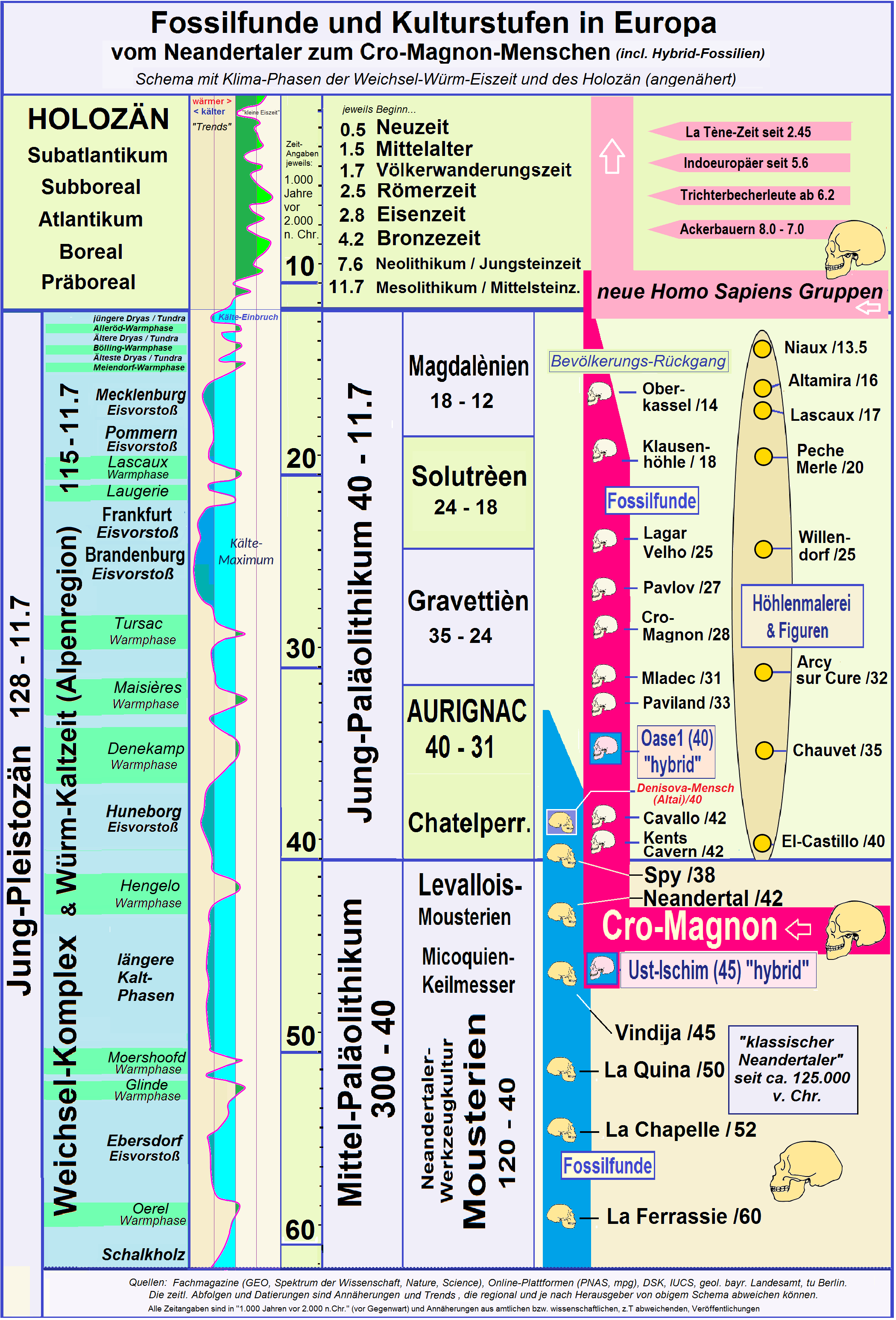 Kulturstufen des Cro-Magnon-Menschen im Jung-Paläolithikum bis zum Übergang ins Mesolithikum